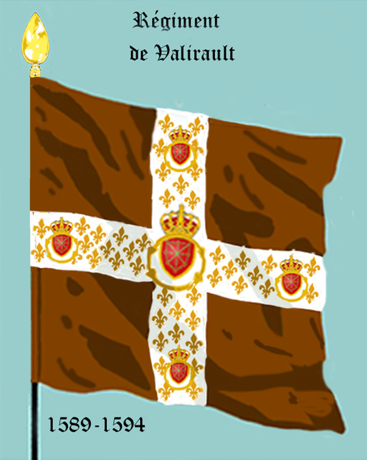 Ordonnanzfahne eines königlich französischen Infanterie-Regiments. - Entnommen und überarbeitet aus: „LES UNIFORMES ET LES DRAPEAUX DE L'ARMÉE DU ROI“ Marseille 1899. (Drapeau d'Ordonnance d' un régiment française d'infanterie royale.)